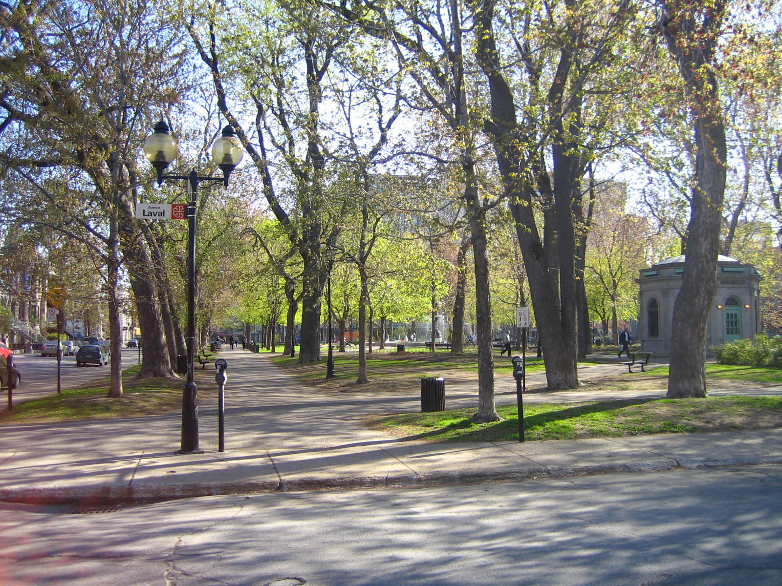 Vue depuis l'Avenue Laval sur le Square Saint-Louis (photo personnel 2005) Utilisateur:FRED